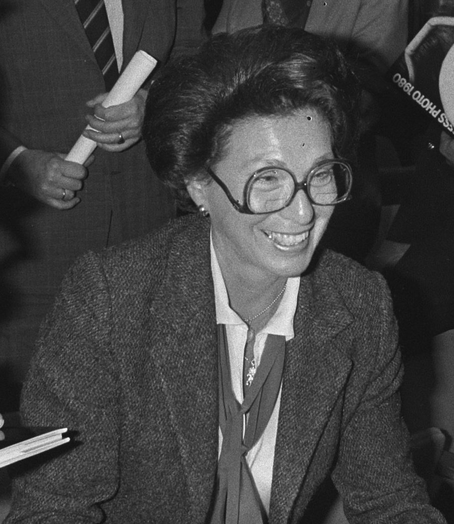 Collectie / Archief : Fotocollectie Anefo Reportage / Serie : [ onbekend ] Beschrijving : Uitreiking prijzen World Press Photo in Tropenmuseum; v.l.n.r. winnaar David Burnett , ambasadrice VS en Prins Bernhard Datum : 2 april 1980 Trefwoorden : PRIJZEN, Uitreikingen, fotografie Persoonsnaam : Bernhard, prins Instellingsnaam : World Press Photo Fotograaf : Suyk, Koen / Anefo Auteursrechthebbende : Nationaal Archief Materiaalsoort : Negatief (zwart/wit) Nummer archiefinventaris : bekijk toegang 2.24.01.05 Bestanddeelnummer : 930-7528